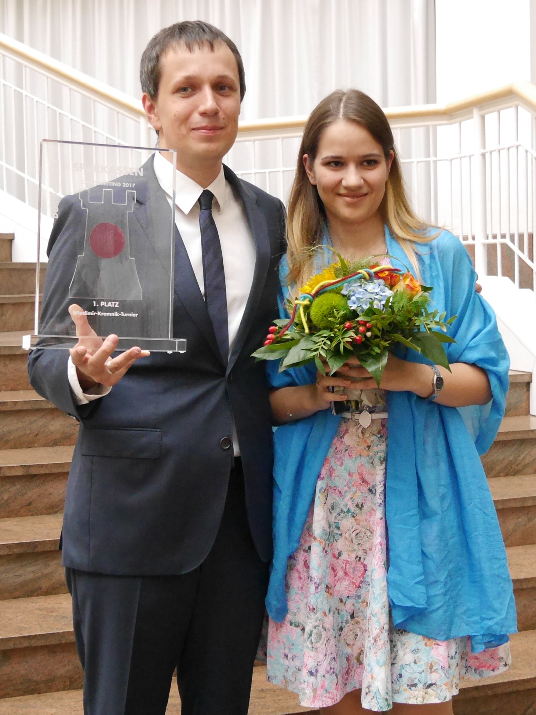 Radoslaw Wojtaszek und Ehefrau Alina Kashlinskaya, Dortmunder Schachtage 2017.